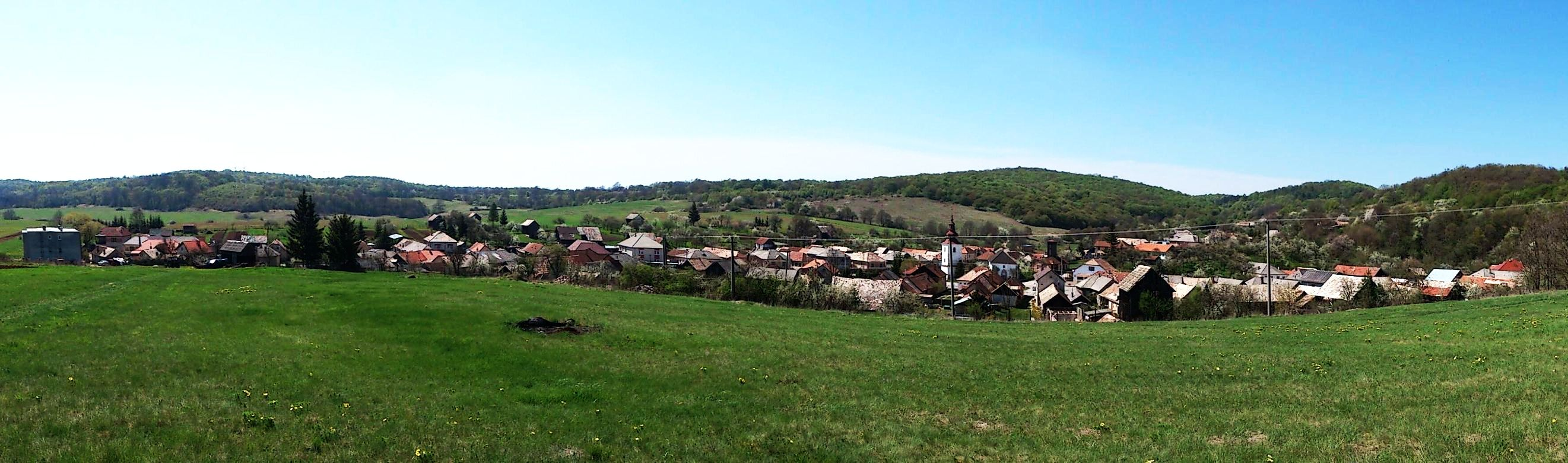 panorama obce brezova